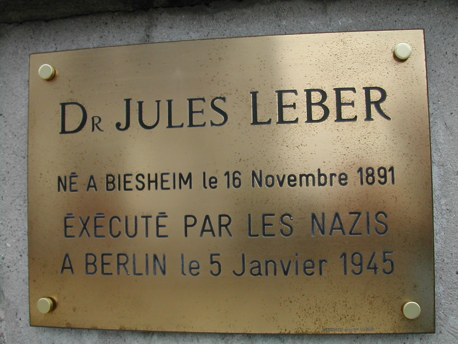 Un bel hommage : plaque en français apposée à l'endroit où se trouvait la maison natale de Julius LEBER à Biesheim (Haut-Rhin)